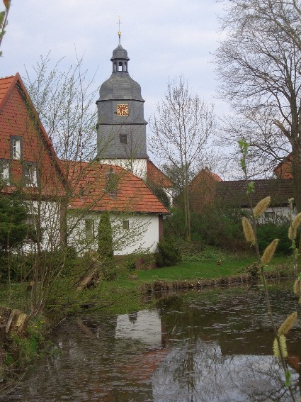 St.-Marienkirche in Wollershausen